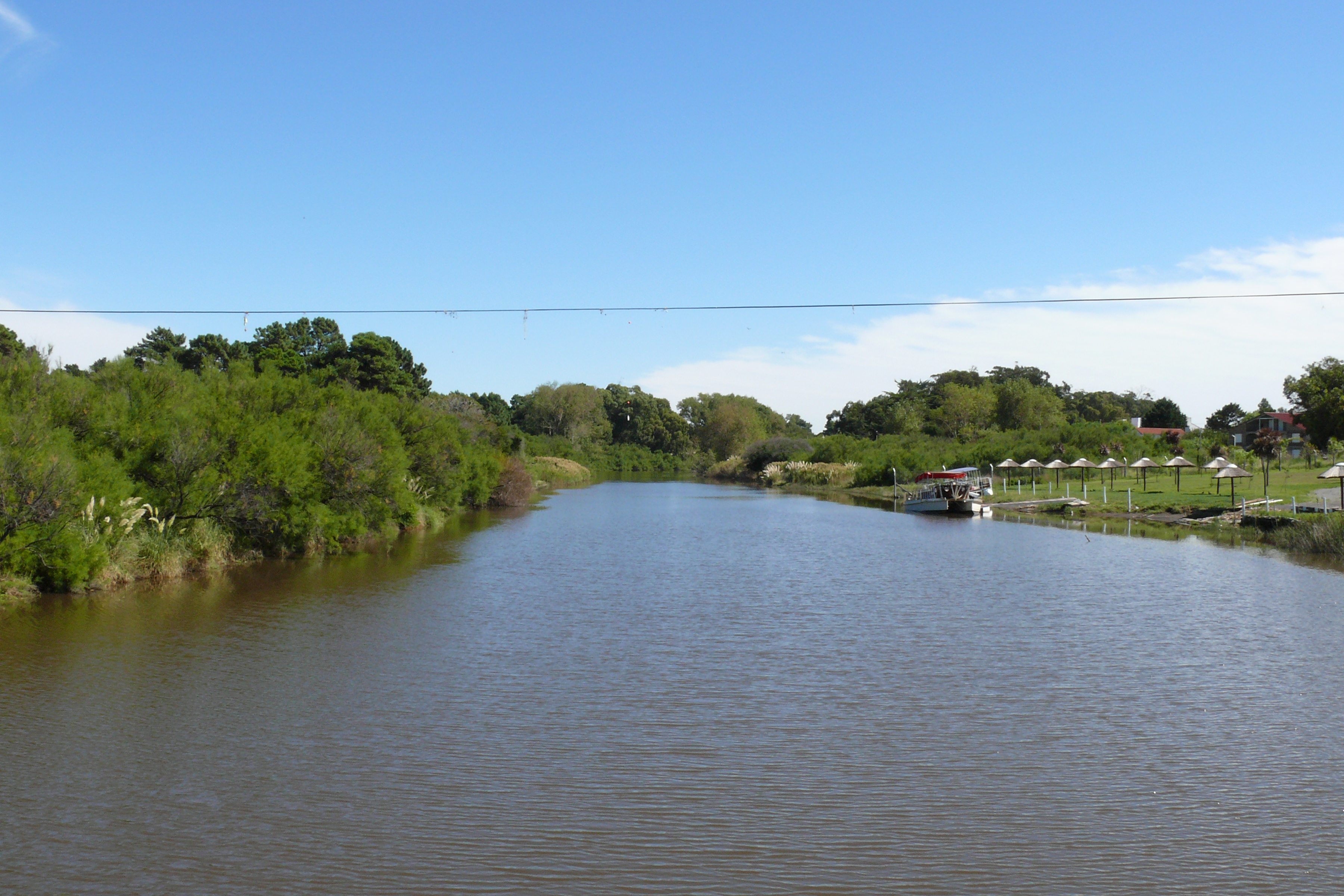 Arroyo Claromeco